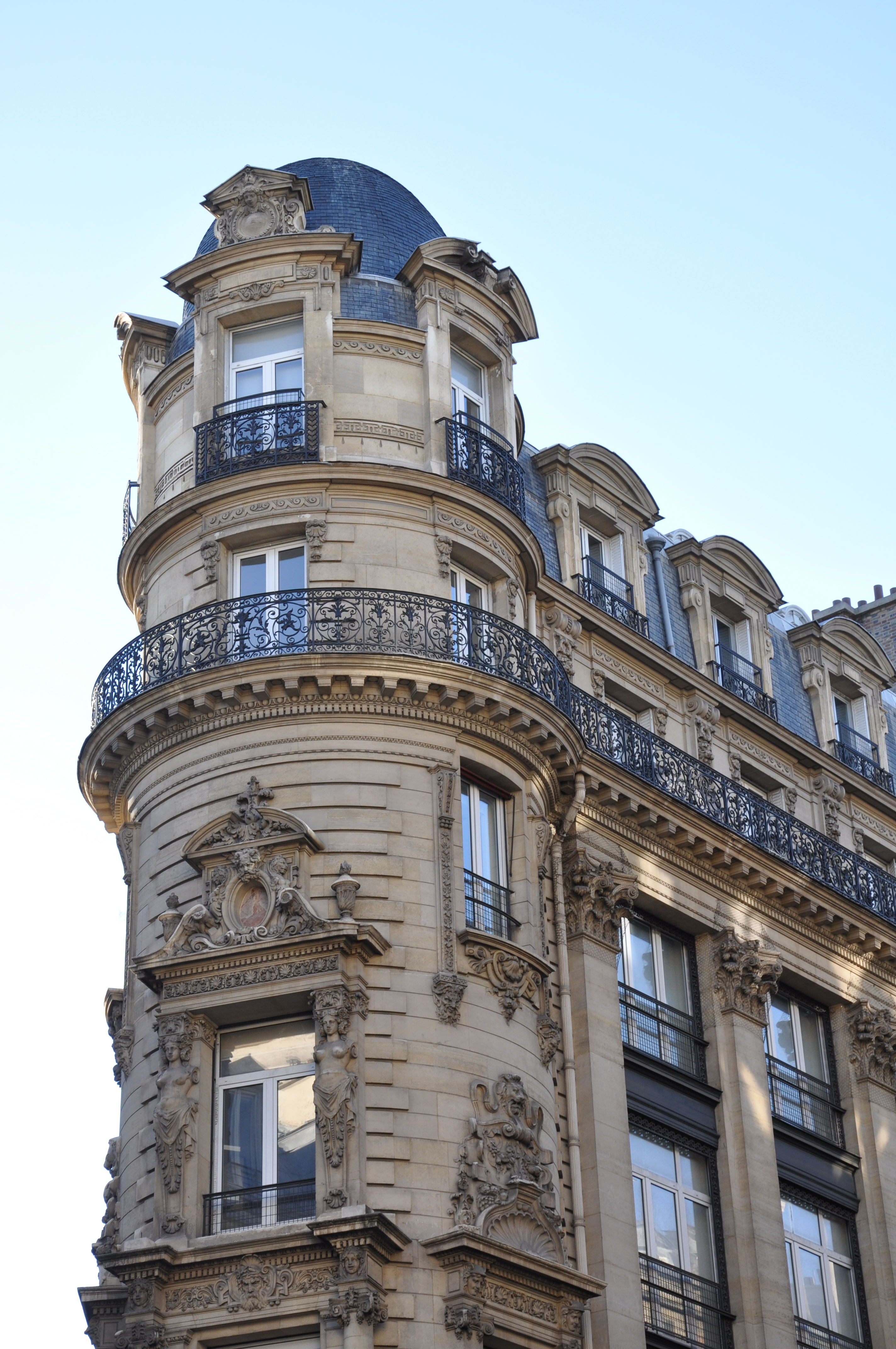 Le 101 rue Réaumur à Paris.